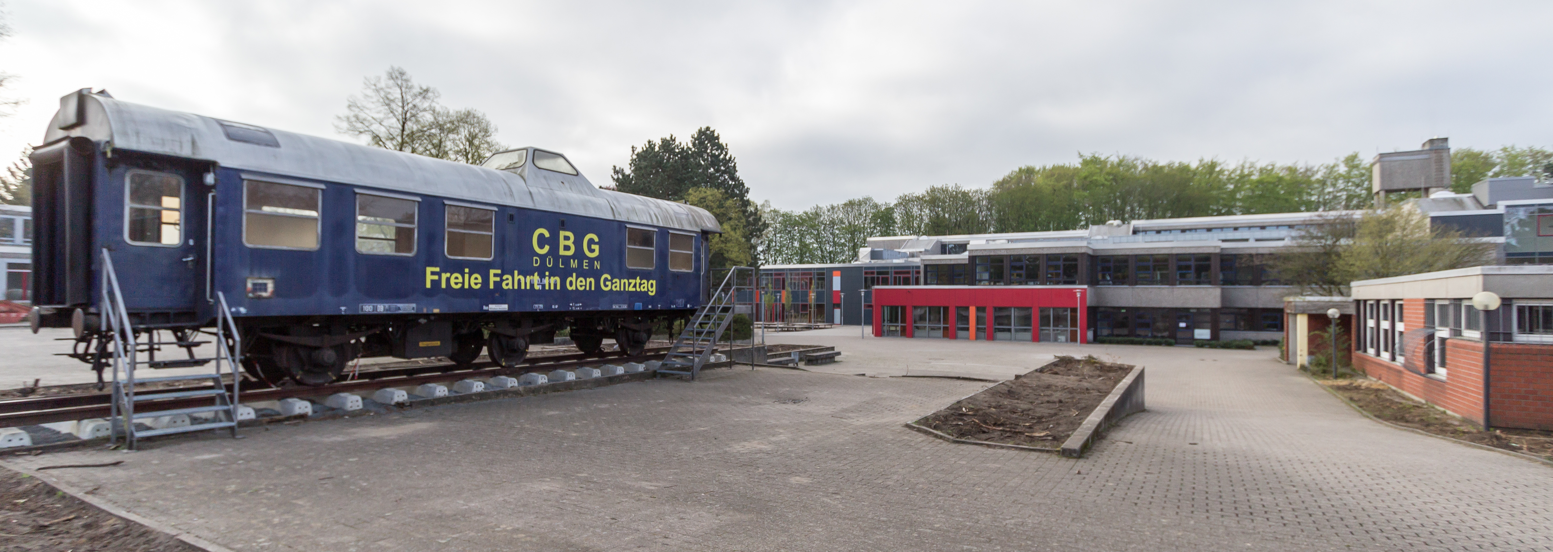 Clemens-Brentano-Gymnasium (Vorbereitung für den Neubau der Mensa), Dülmen, Nordrhein-Westfalen, Deutschland